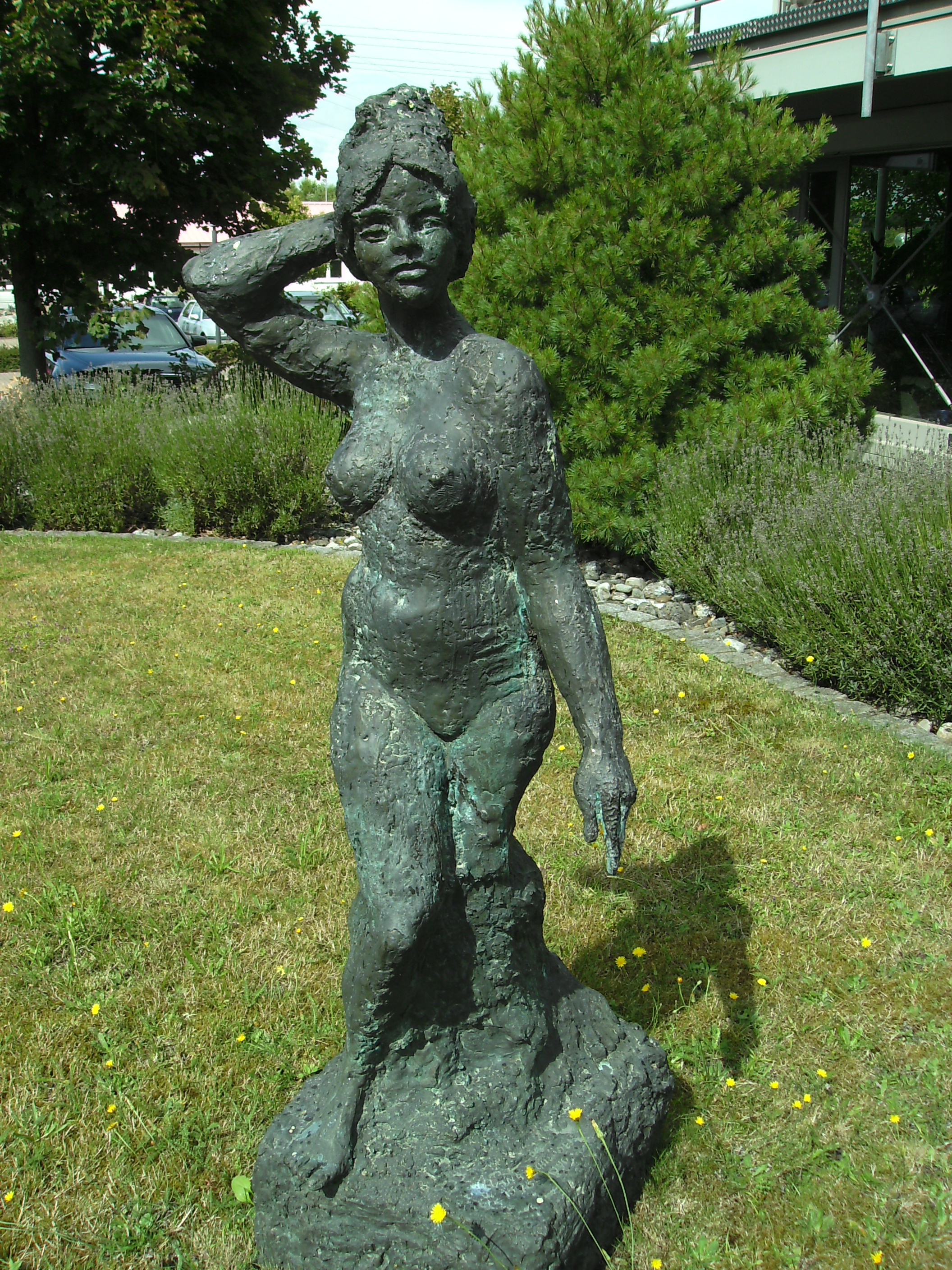 Hans Schröder (Künstler): Plastik "Nackte Frau" (Bronze)